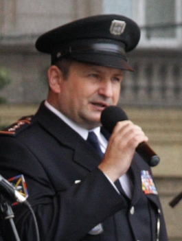 Brno, náměstí Svobody - slavnostní přísaha nových členů PČR a HZS JMK. Policejní ředitel plk. Tomáš Tuhý.